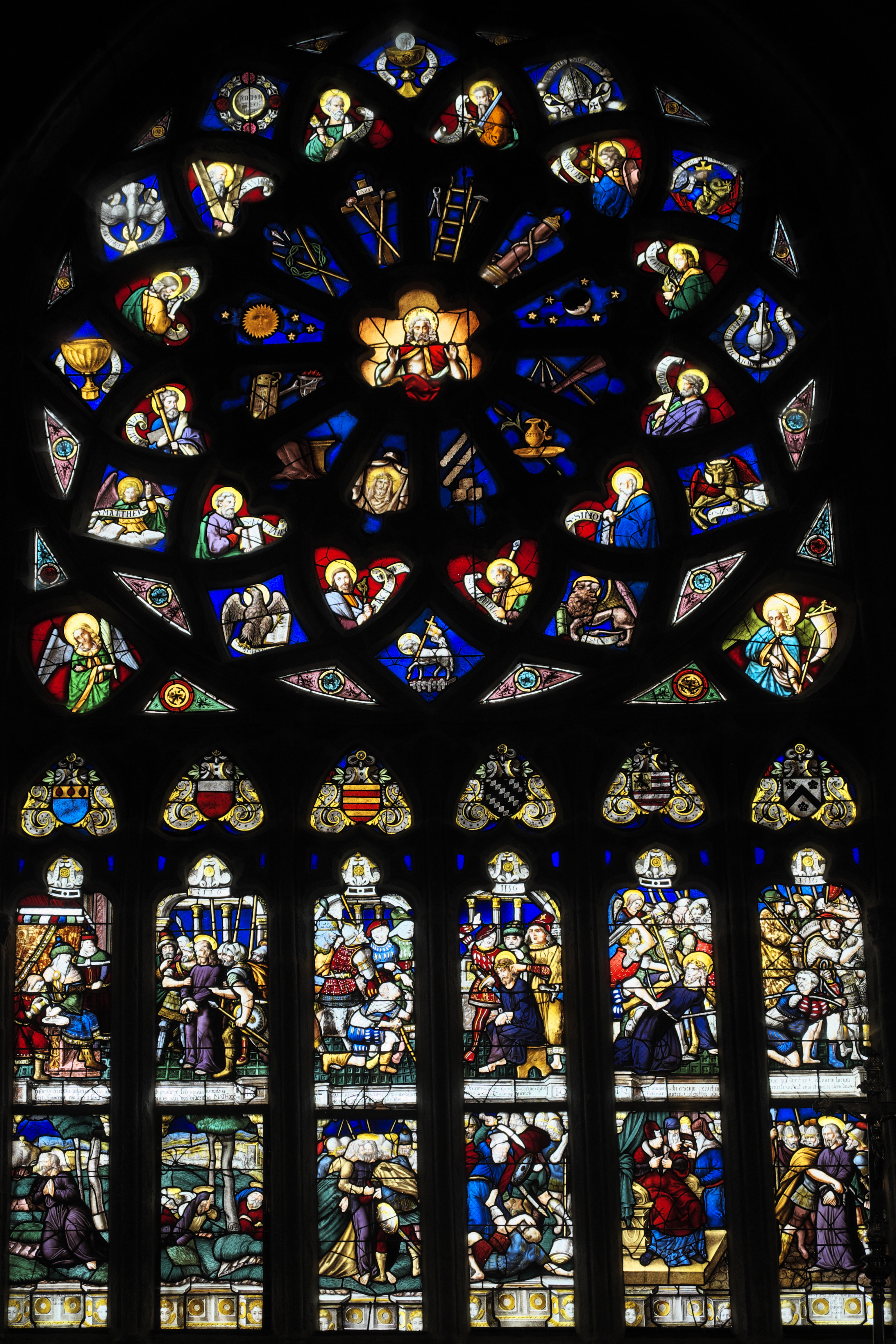 Passionsfenster in der Kapelle Saint-Herbot in Saint-Herbot (Plonévez-du-Faou) im Département Finistère (Region Bretagne/Frankreich), Bleiglasfenster (baie 0) von 1556, 1886 von Eugène und Ferdinand Hucher in der Glasmalereiwerkstatt der Karmelitinnen von Le Mans restauriert; Darstellung: Passion